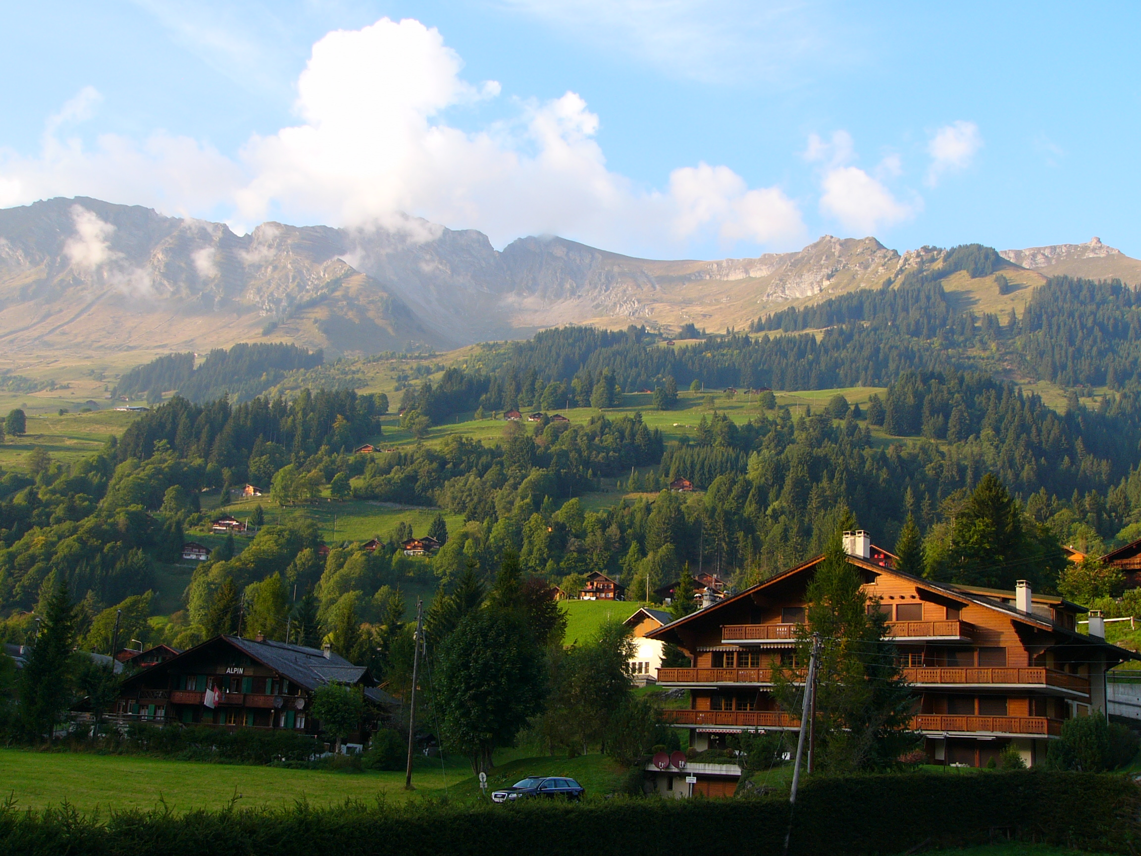 Les Diablerets